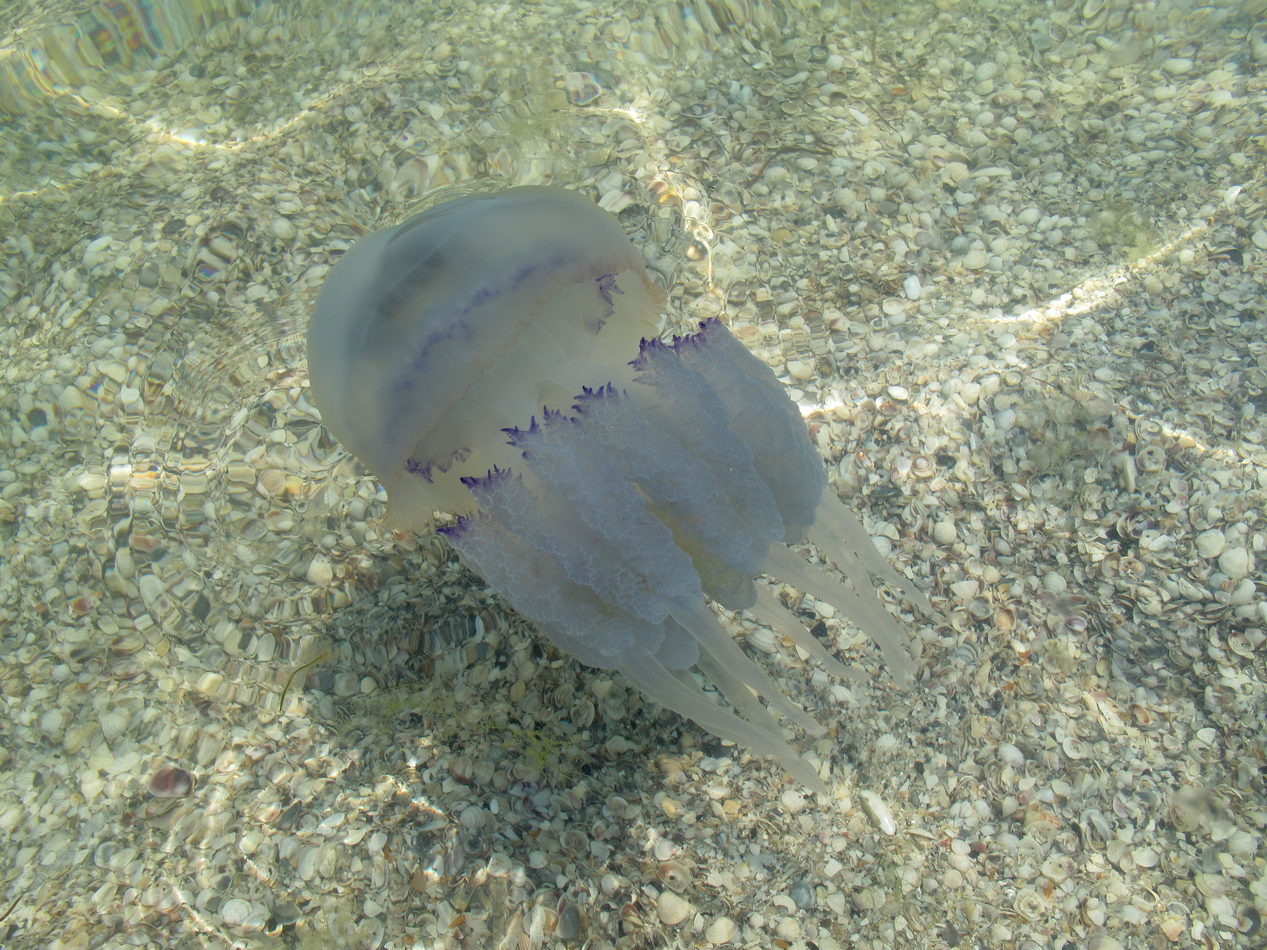 Джарилгацький, Скадовський район, Адміністрація створюється